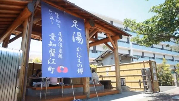 愛知県海部郡蟹江町にある足湯かにえの郷